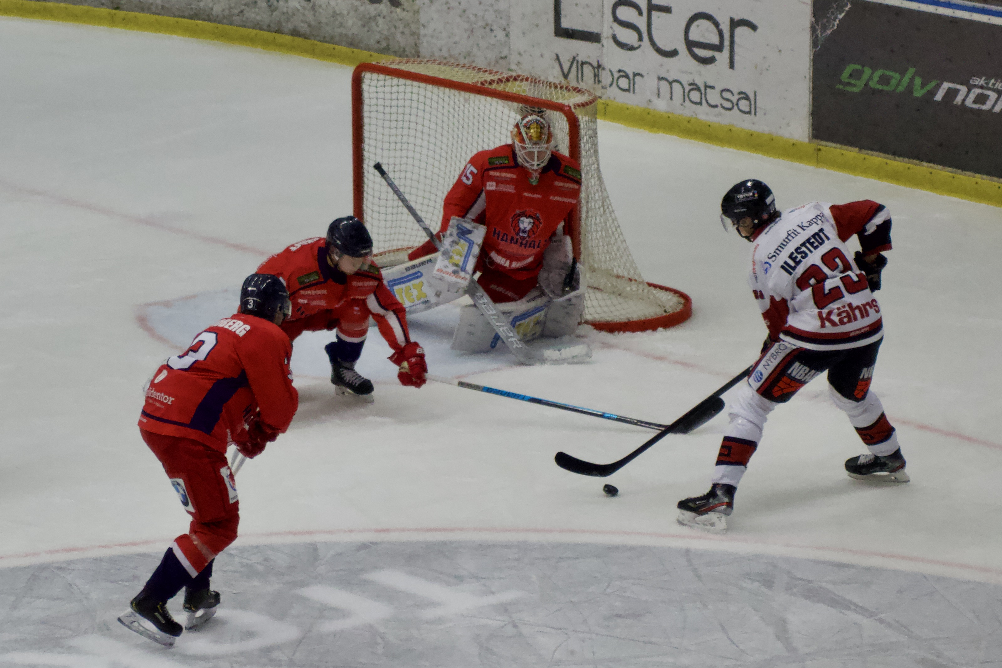 Matchinfo